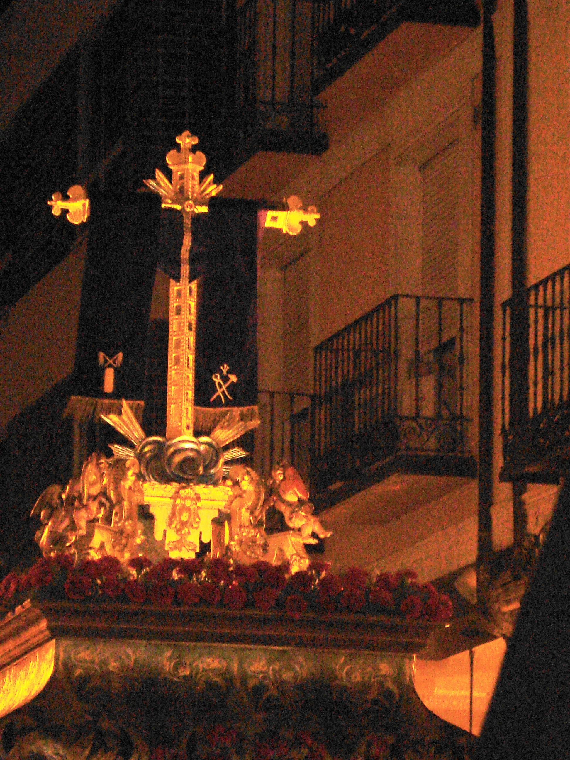 Santa Vera-Cruz